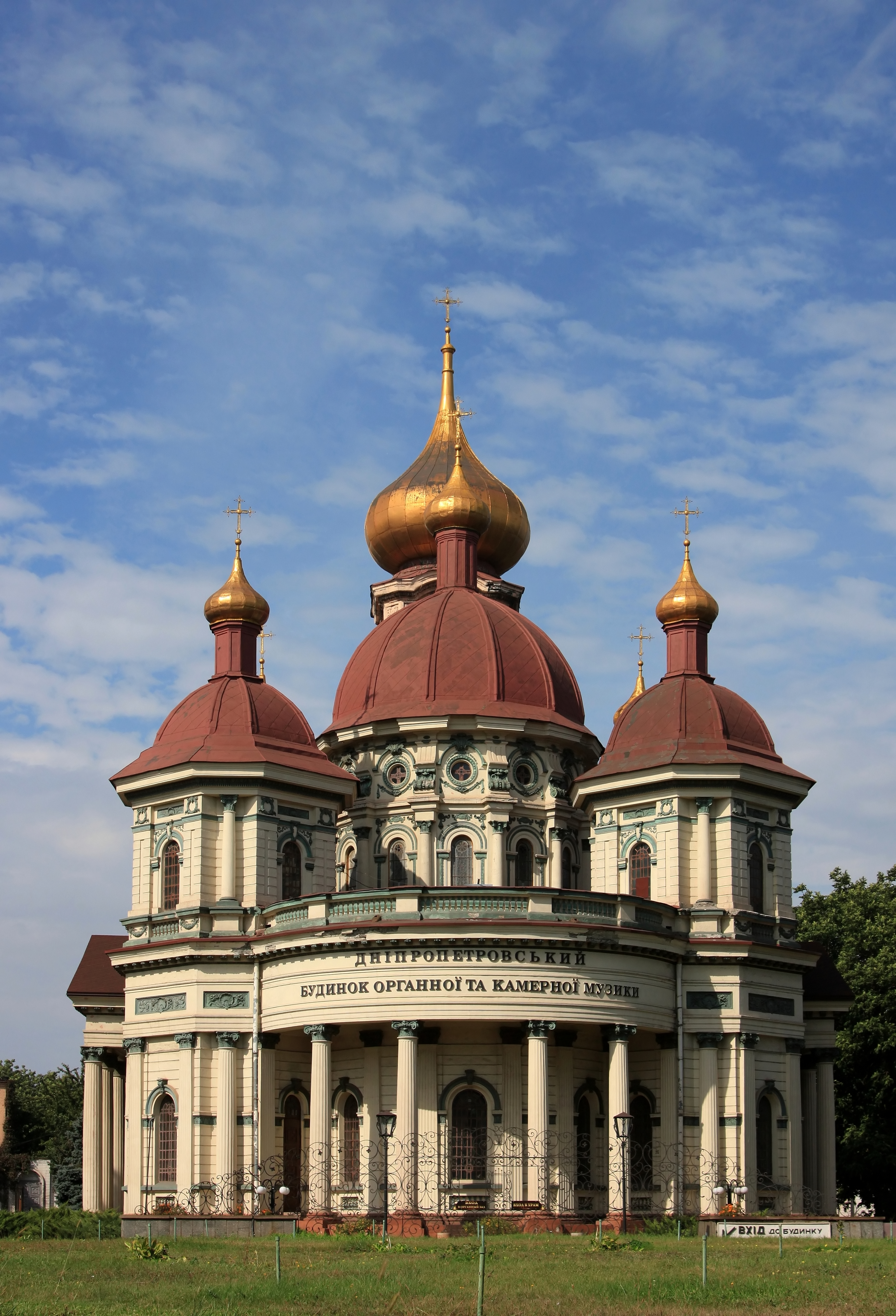 Брянська Миколаївська церква (мур.), Дніпропетровськ, пр.Калініна, 66